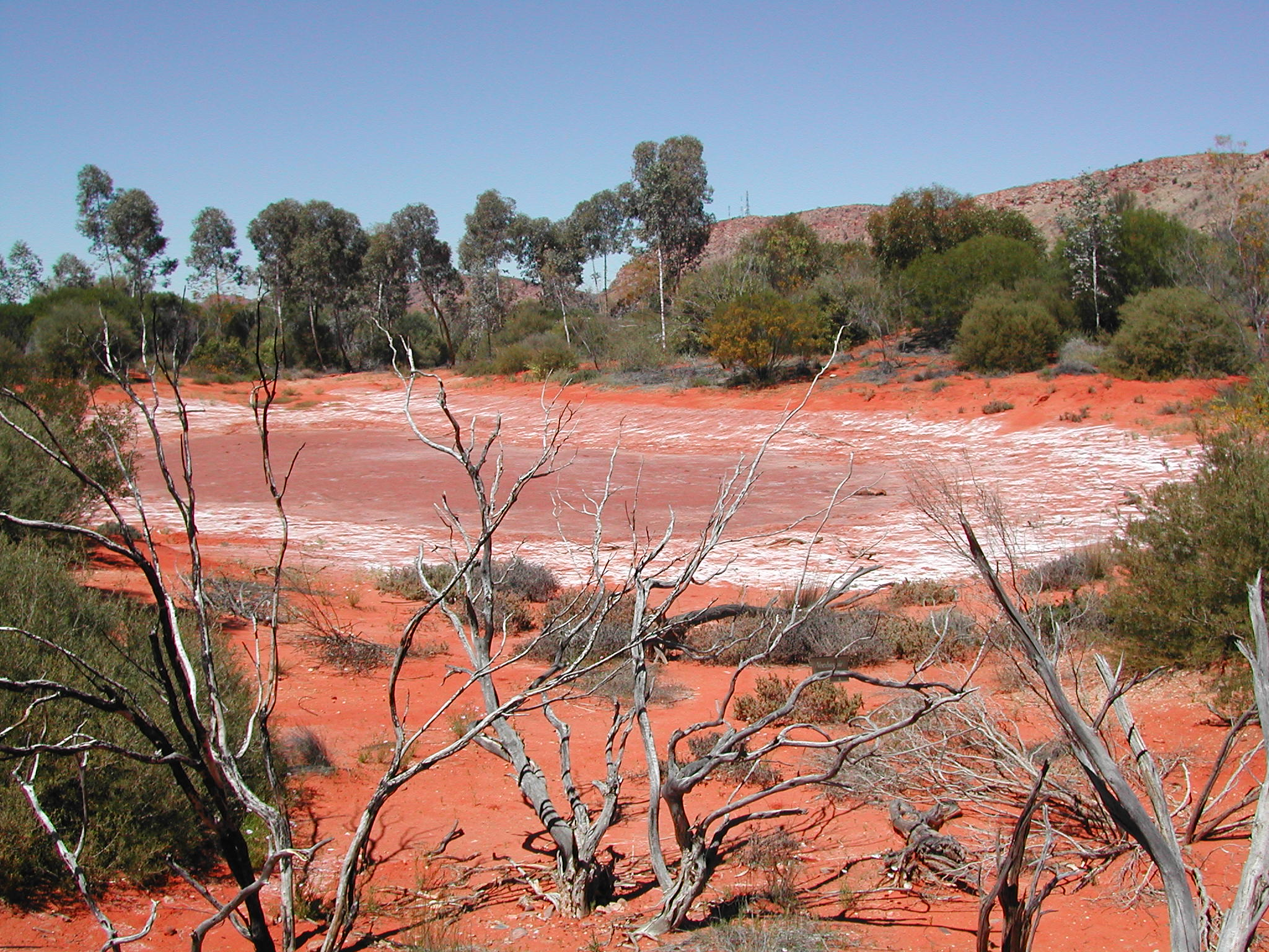 Eng ausgedréchent Waasserstell am Desert Park